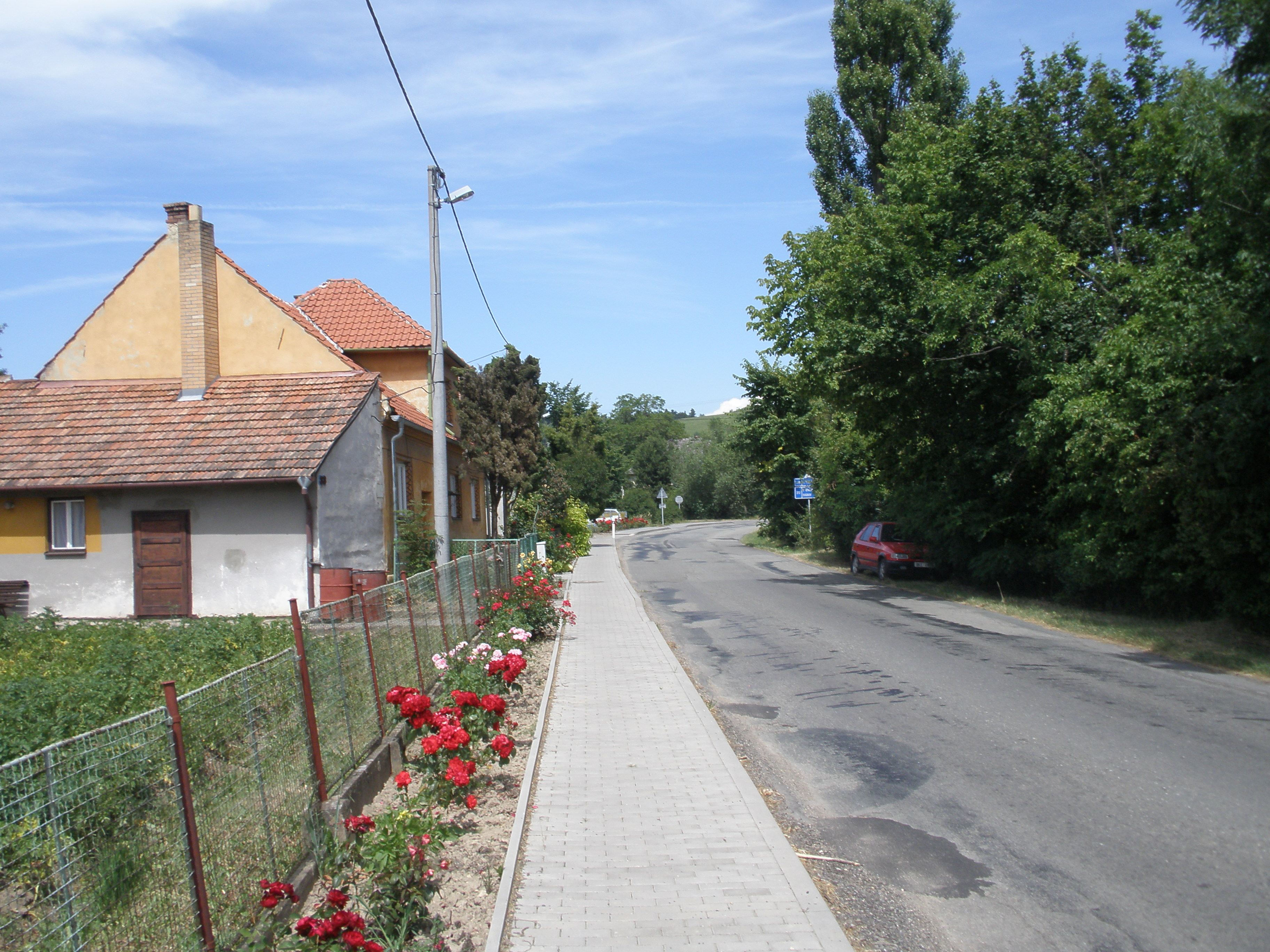 Vesnice Chlum, která je součástí města Letovice